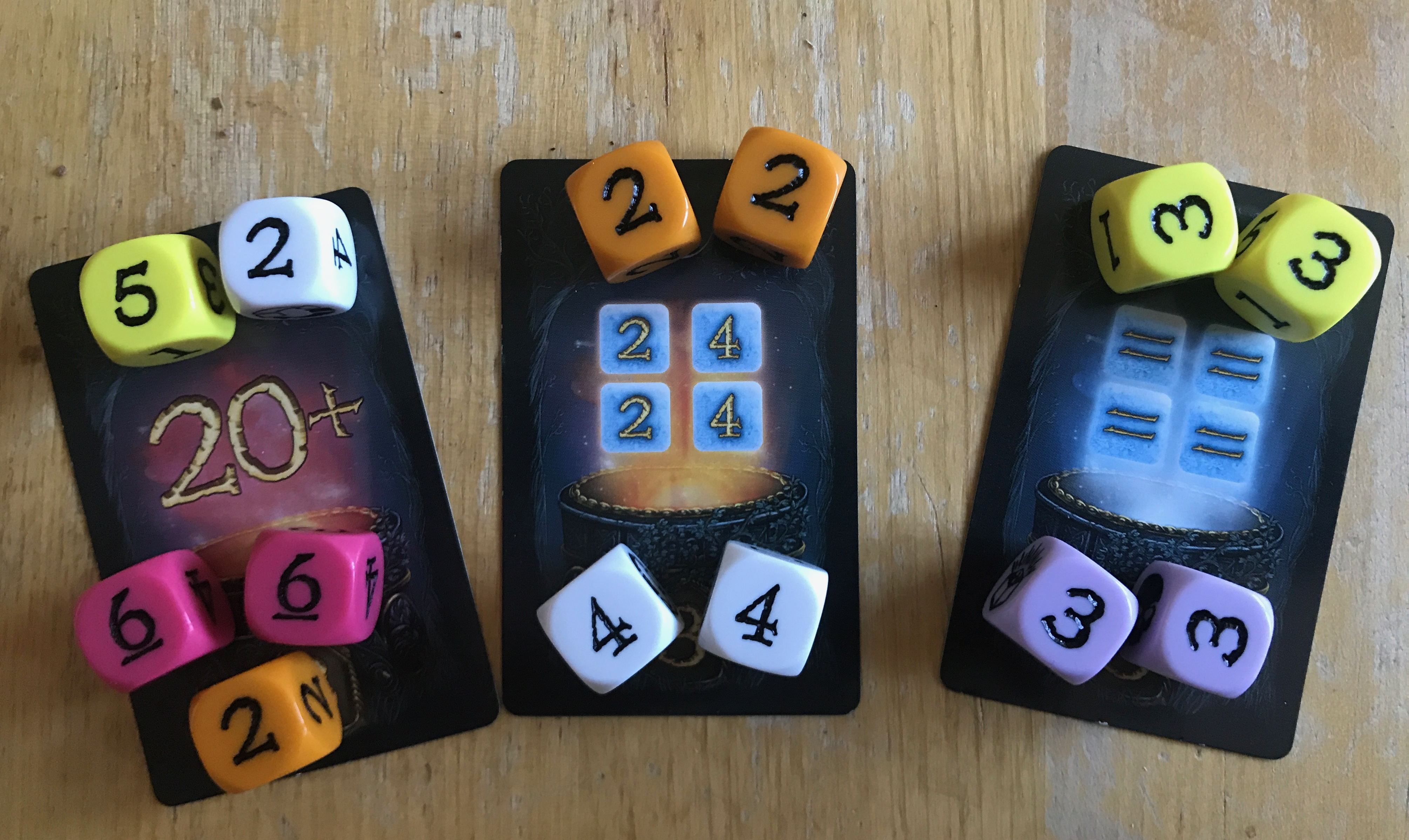 ciúb, Spielmaterial